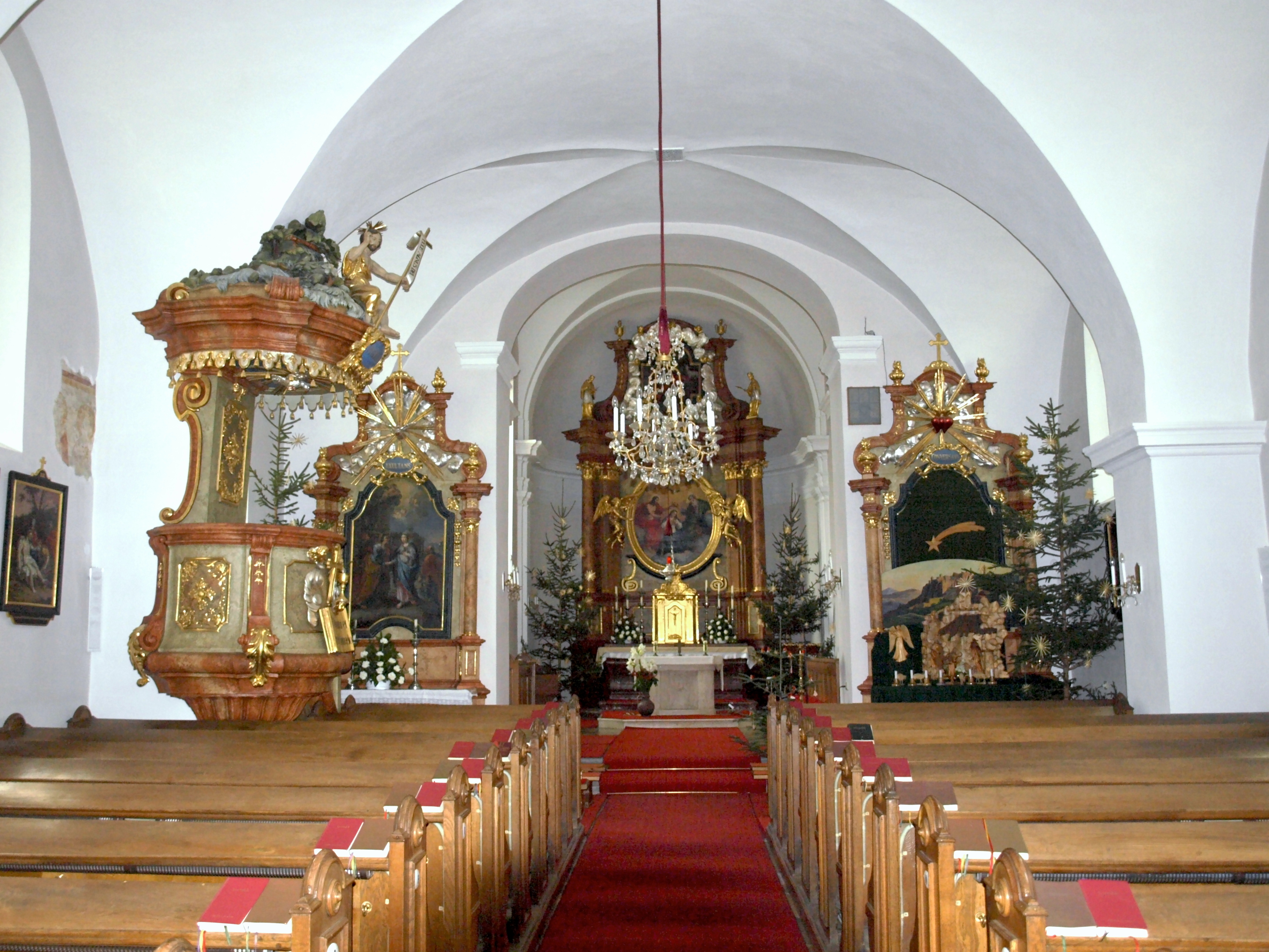 Kath. Pfarrkirche hl. Johannes der Täufer und ehem. Friedhof